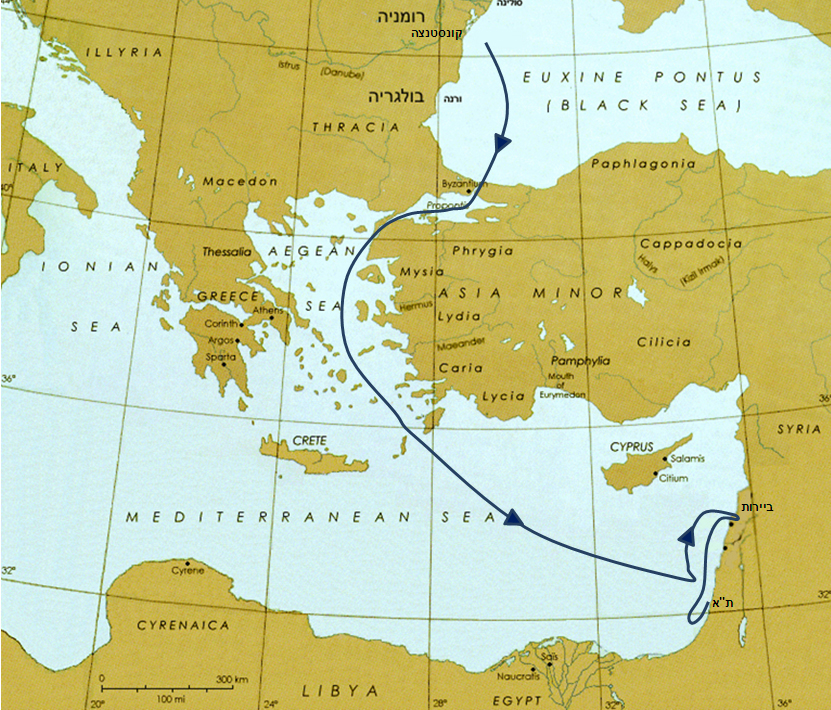 אוניית המעפילים טייגר היל - מסלול